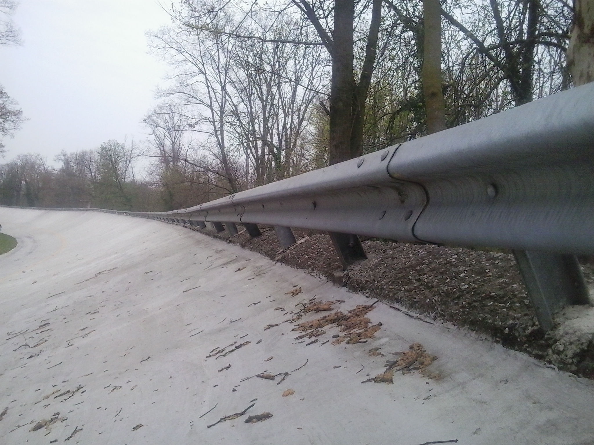 Sopraelevata dell'Autodromo nazionale di Monza